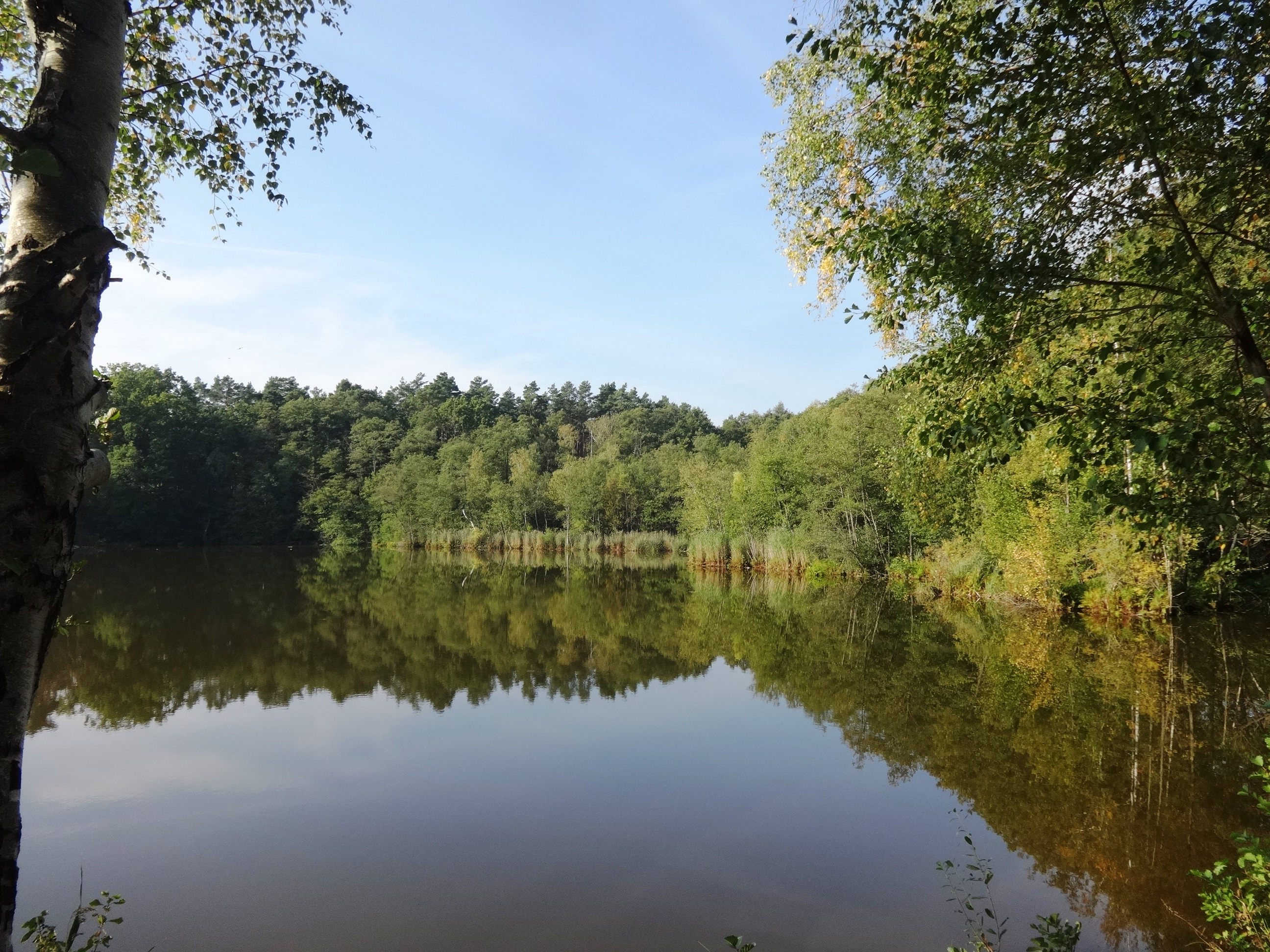 Die Heideseen sind eine kleine Seenplatte südlich der Stadt Märkisch Buchholz, die teilweise zum Gemeindeteil Köthen gehören.